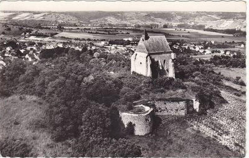 Il s'agit des ruines du chateau . On peut remarquer la vigne avant le passage du Phylloxera fin 19e début 20e et la Chapelle avant la reconstruction de la muraille du château.